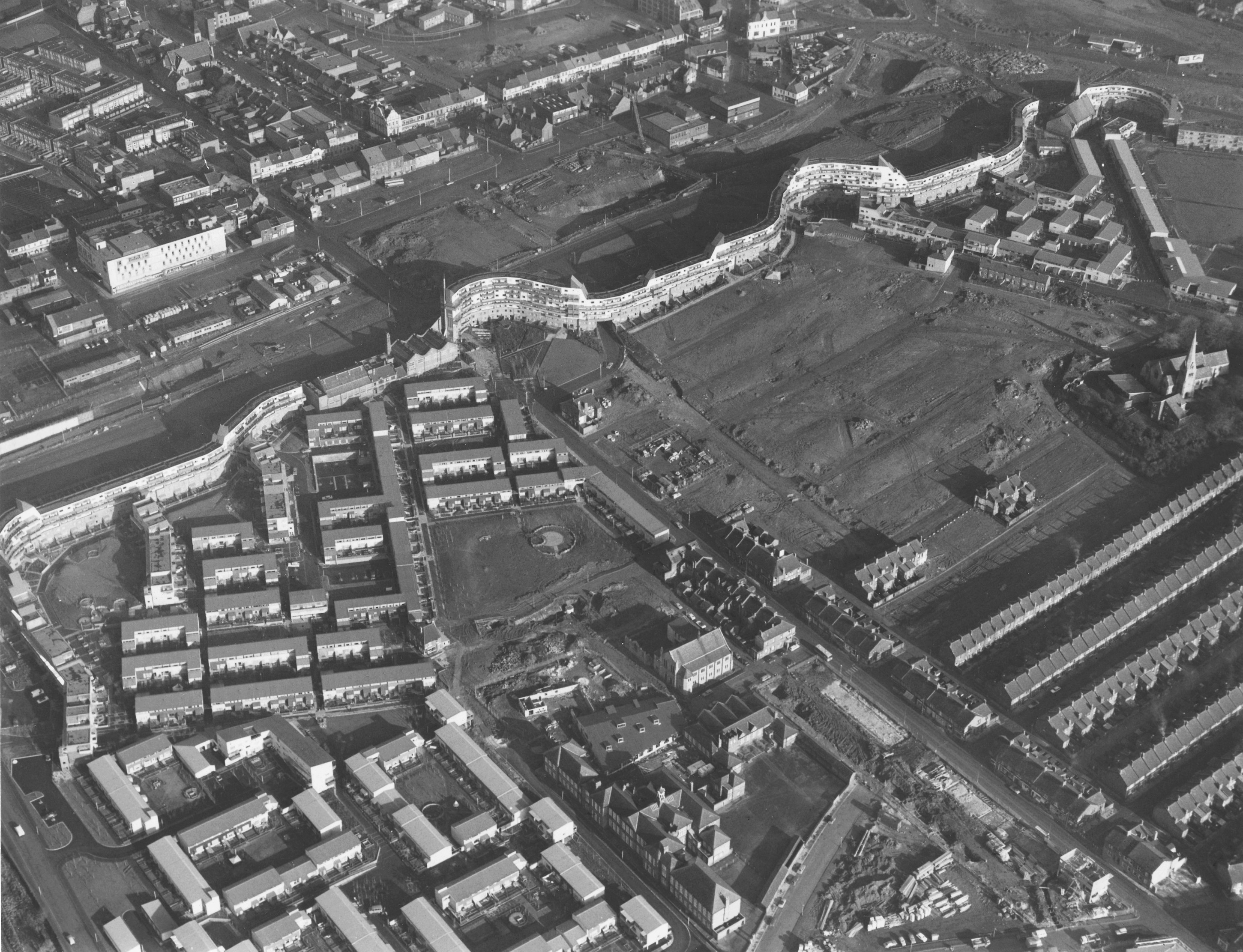 Flygfoto över stadsdelen Byker i Storbritannien (GB), Newcastle